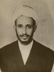 عضو المجلس الرئاسي اليمني أحمد محمد نعمان عام ١٩٤٦.